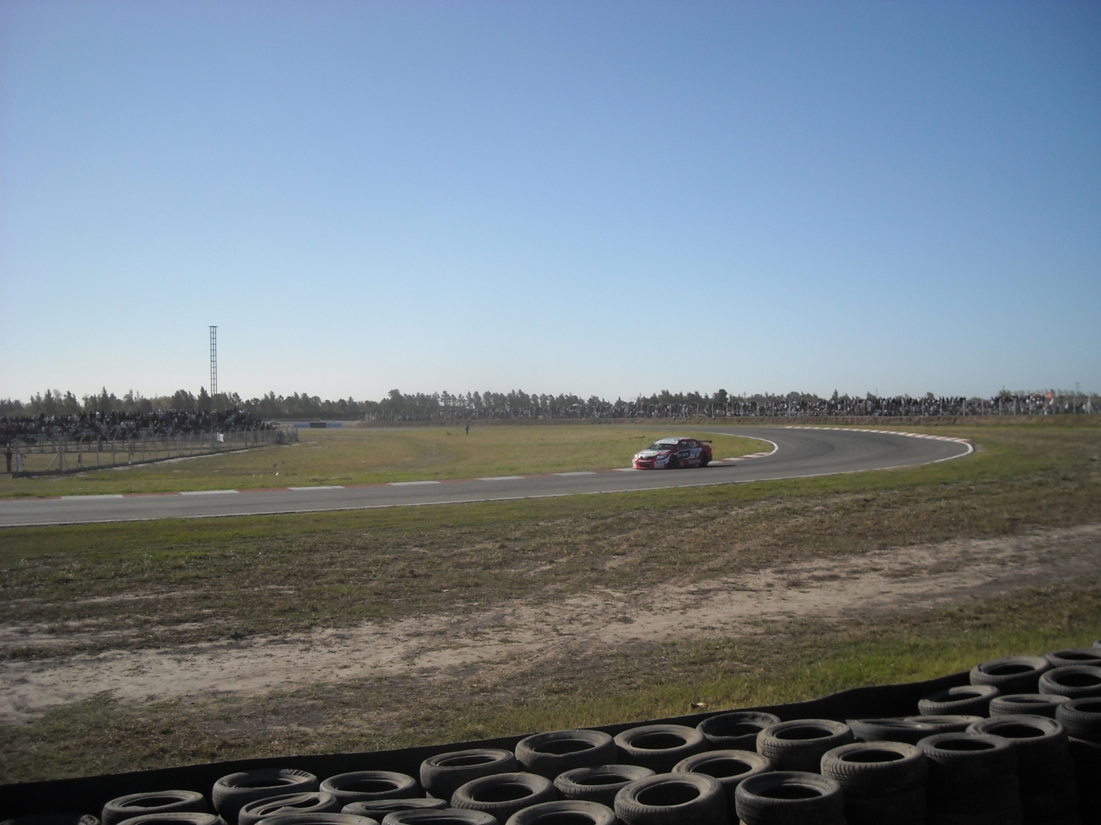 Clasificacion del Super TC 2000 en el Autodromo de Rosario